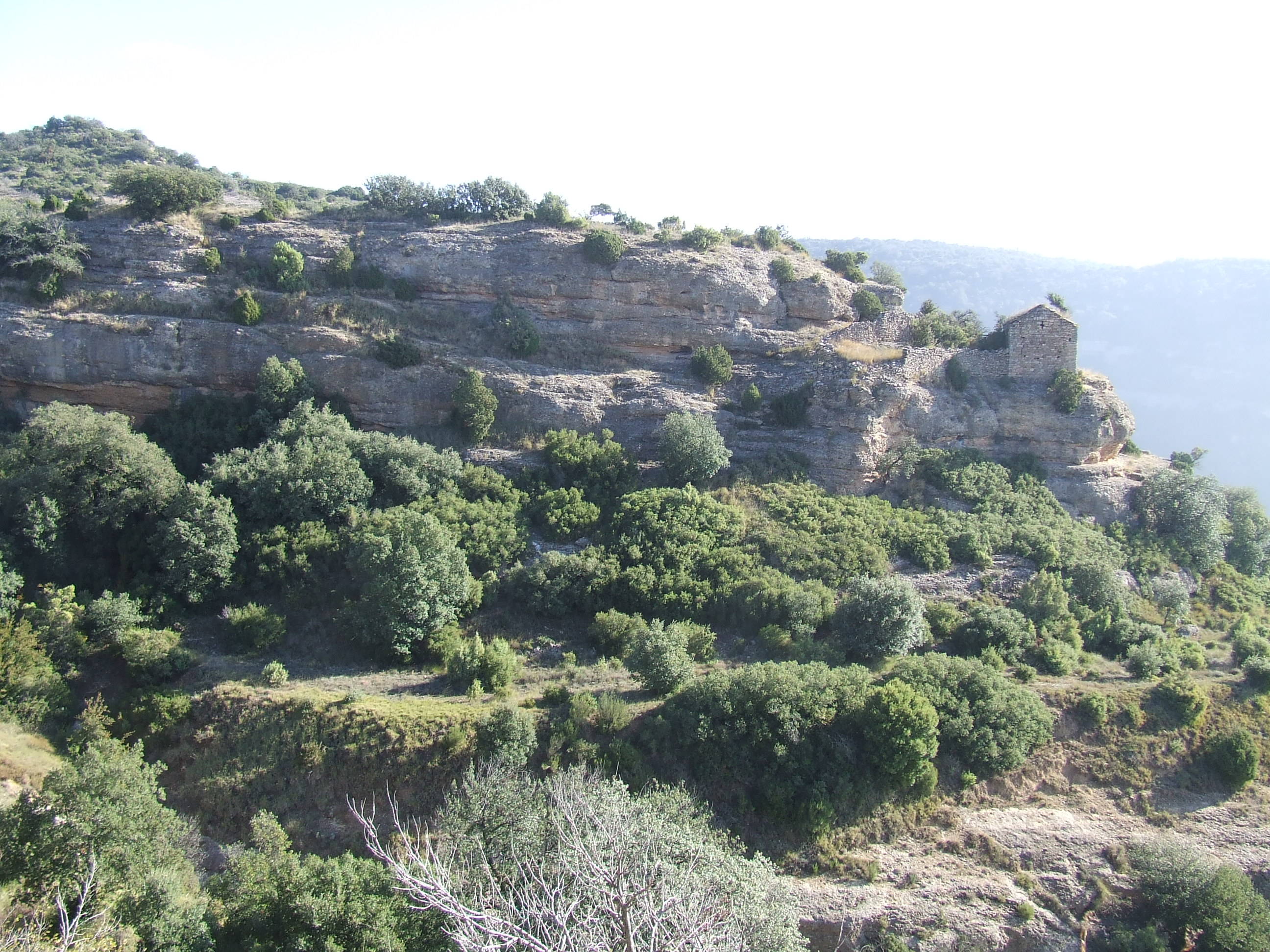 L'església de Santa Anna de Montadó, damunt la cinglera (Benavent de la Conca, Isona i Conca Dellà, Pallars Jussà)